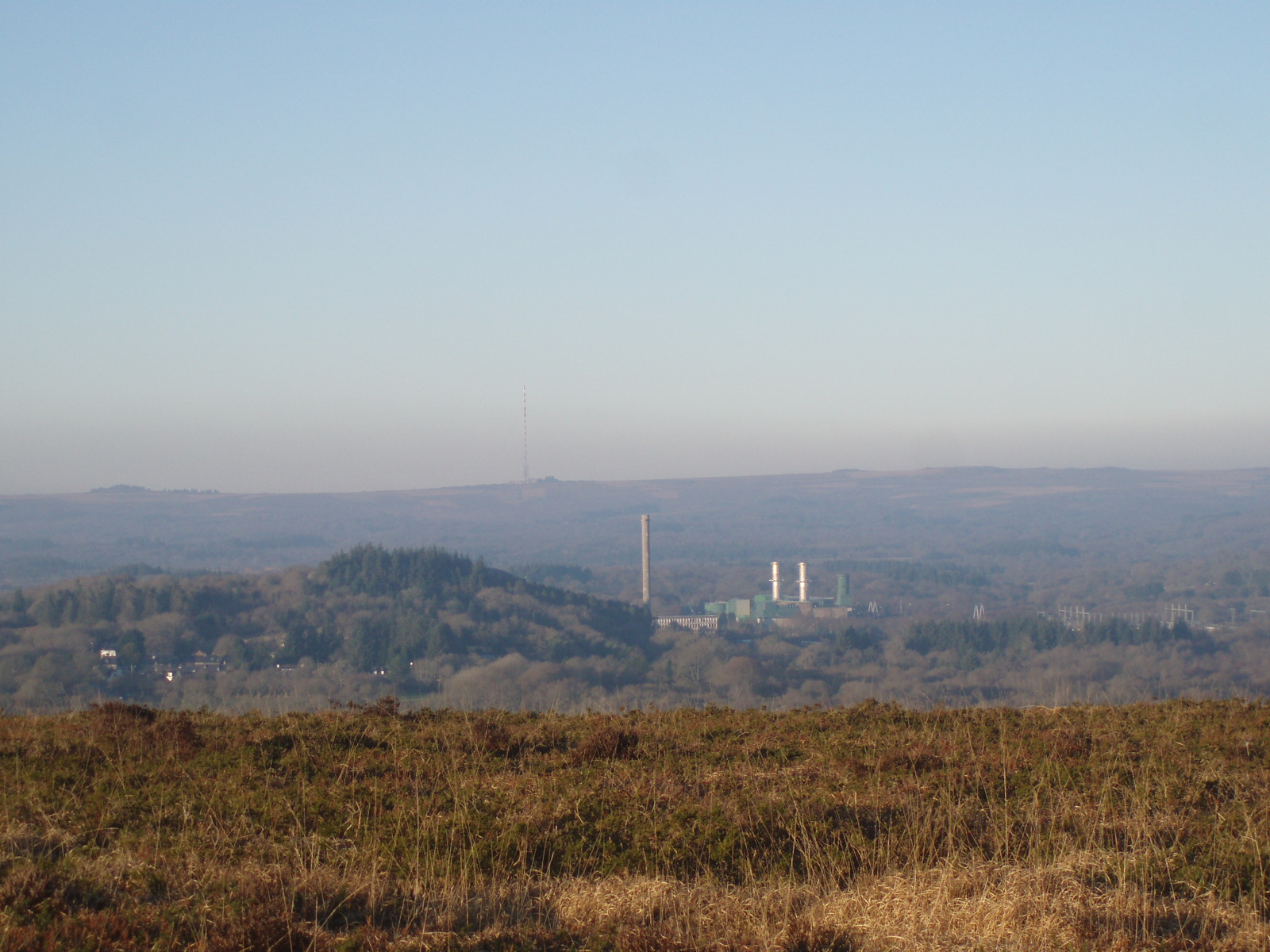 L'ancienne centrale nucléaire de Brennilis et les turbines à gaz vues depuis le mont Keryeven. A l'arrière-plan, les Monts d'Arrée (dont le Roc Trévézel) et l'antenne de Roc Trédudon.